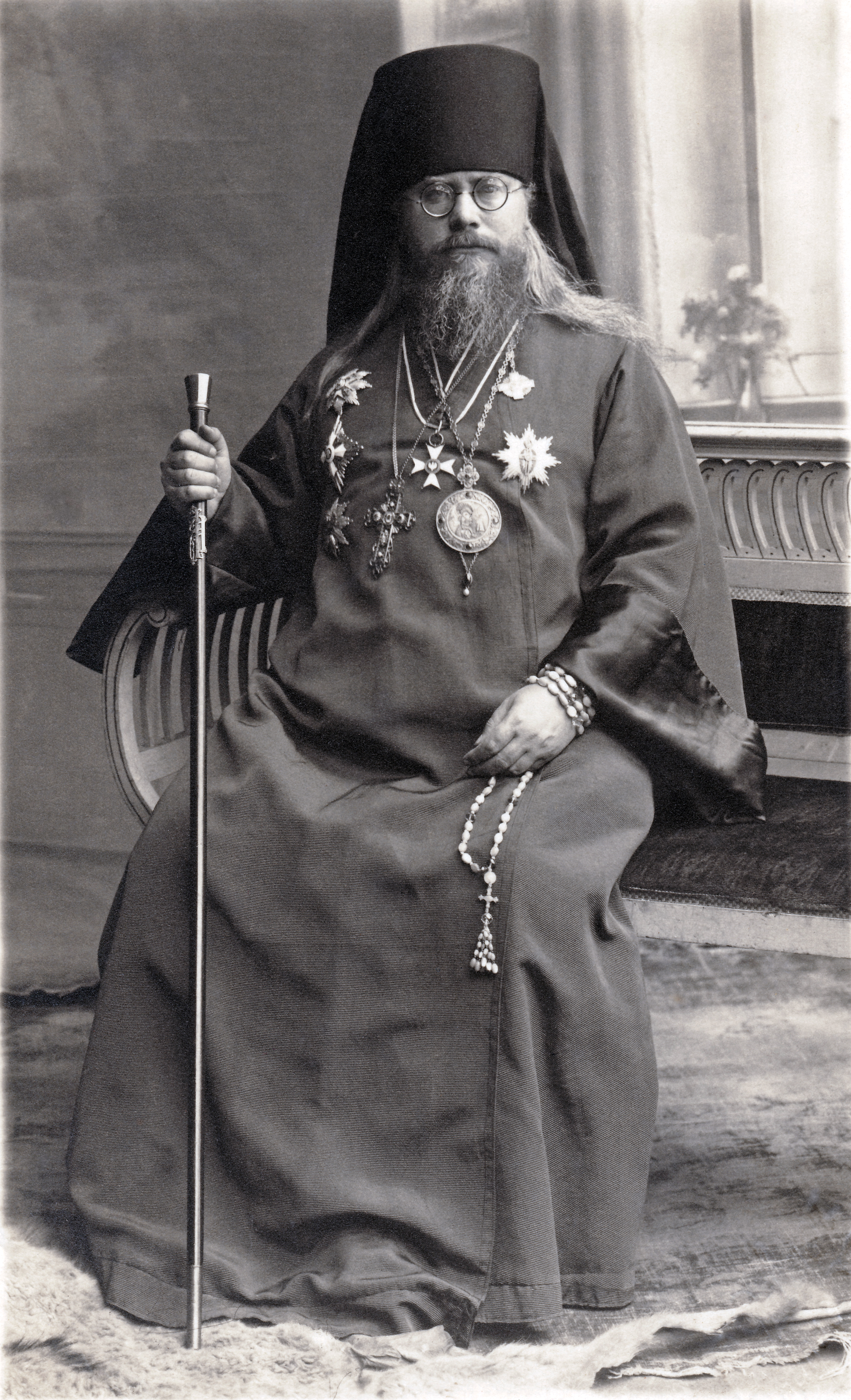 Архиепископ Алексий (Громадский). Снимок сделан в начале 1930-х годов в г. Гродно в фотоателье Л. Гельгора.